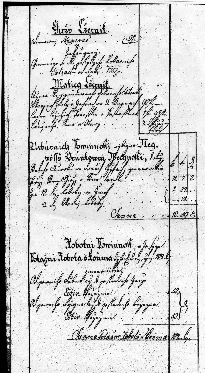 Urbář pro Jiržiho Cžernika, Jezbořice u Pardubic, 1744